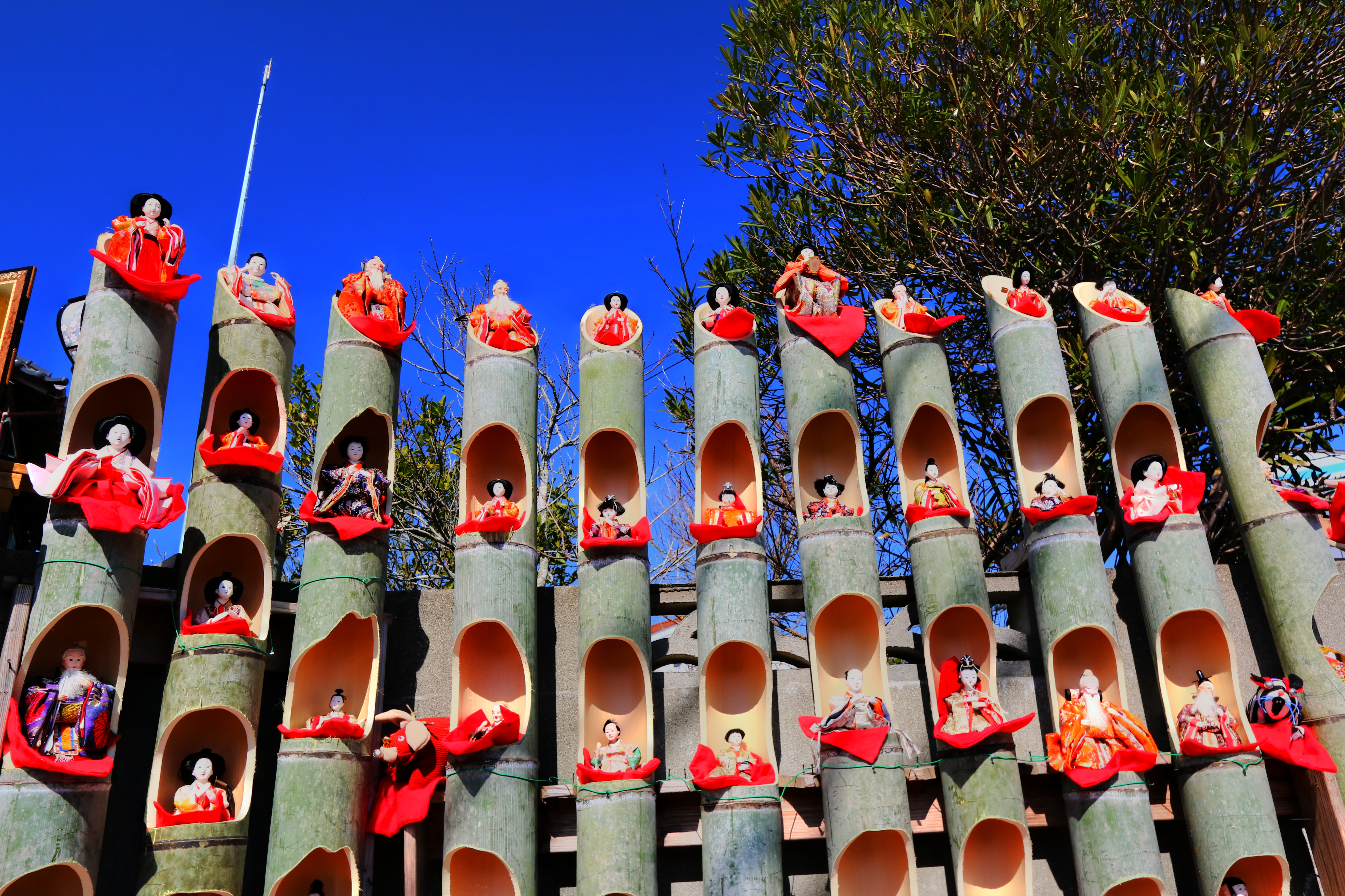 勝浦駅入口交差点付近の風景